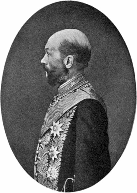 Дмитрий Николаевич Набоков, сенатор, министр юстиции.